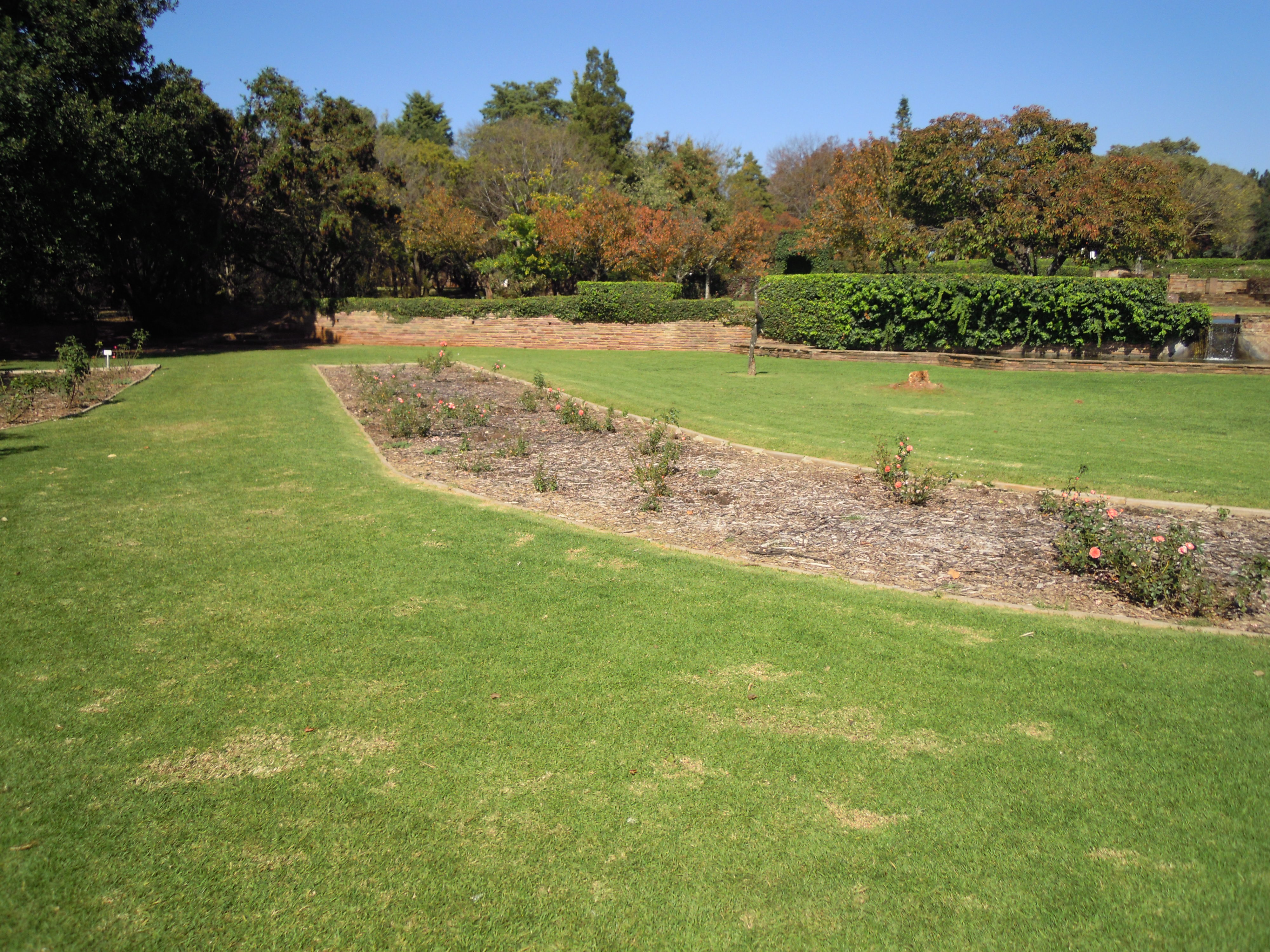 Bed with few rose plants in rose garden at Johannesburg Botanical Gardens